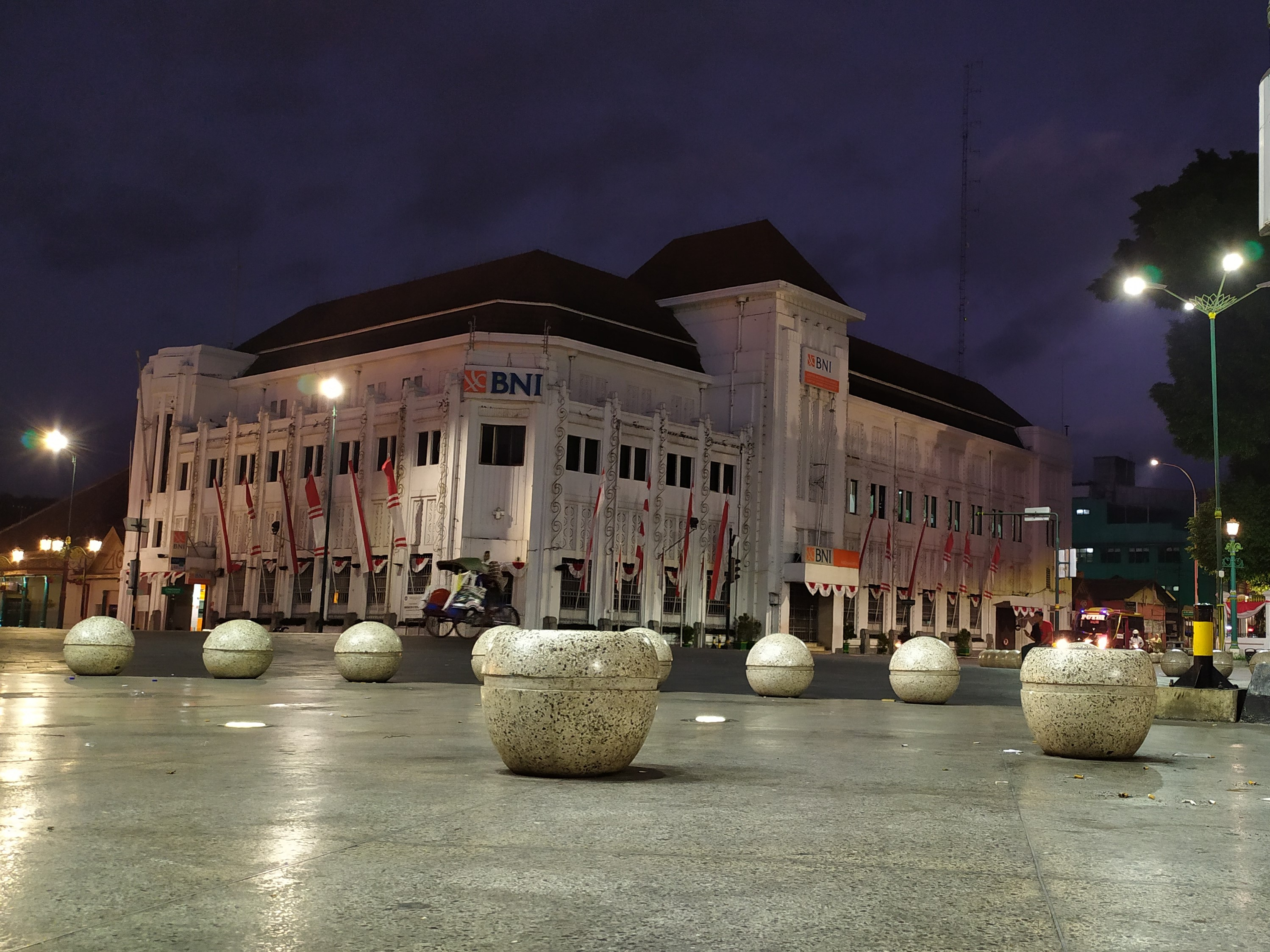 Gedung BNI 1946 berada di Jalan Trikora No.1 Yogyakarta, Ngupasan, Gondomanan, Kota Yogyakarta. Status kepemilikan ada pada pemerintah yang dikelola oleh BNI 1946. Gedung ini memiliki nilai arkeologis sebagai bangunan bergaya arsitektur indis.